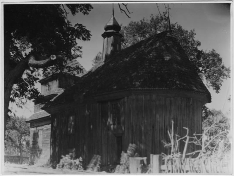 Беларуская (тарашкевіца): Рамель (Ramiel). Царква